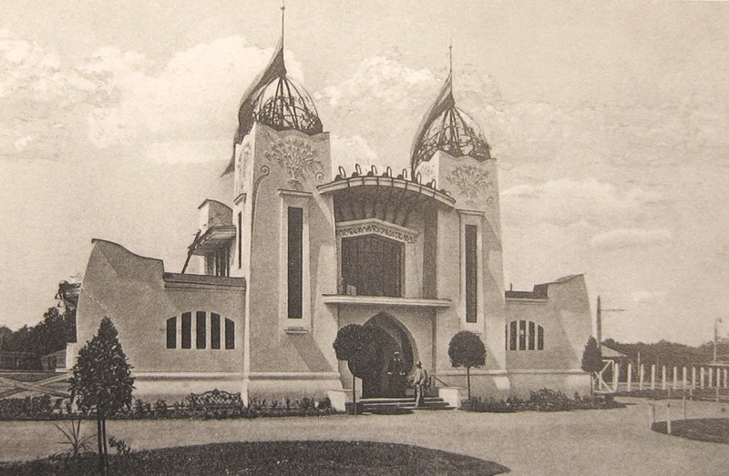 Выставочный павильон Товарищества Алафузовых в Казани (парк "Русская Швейцария")